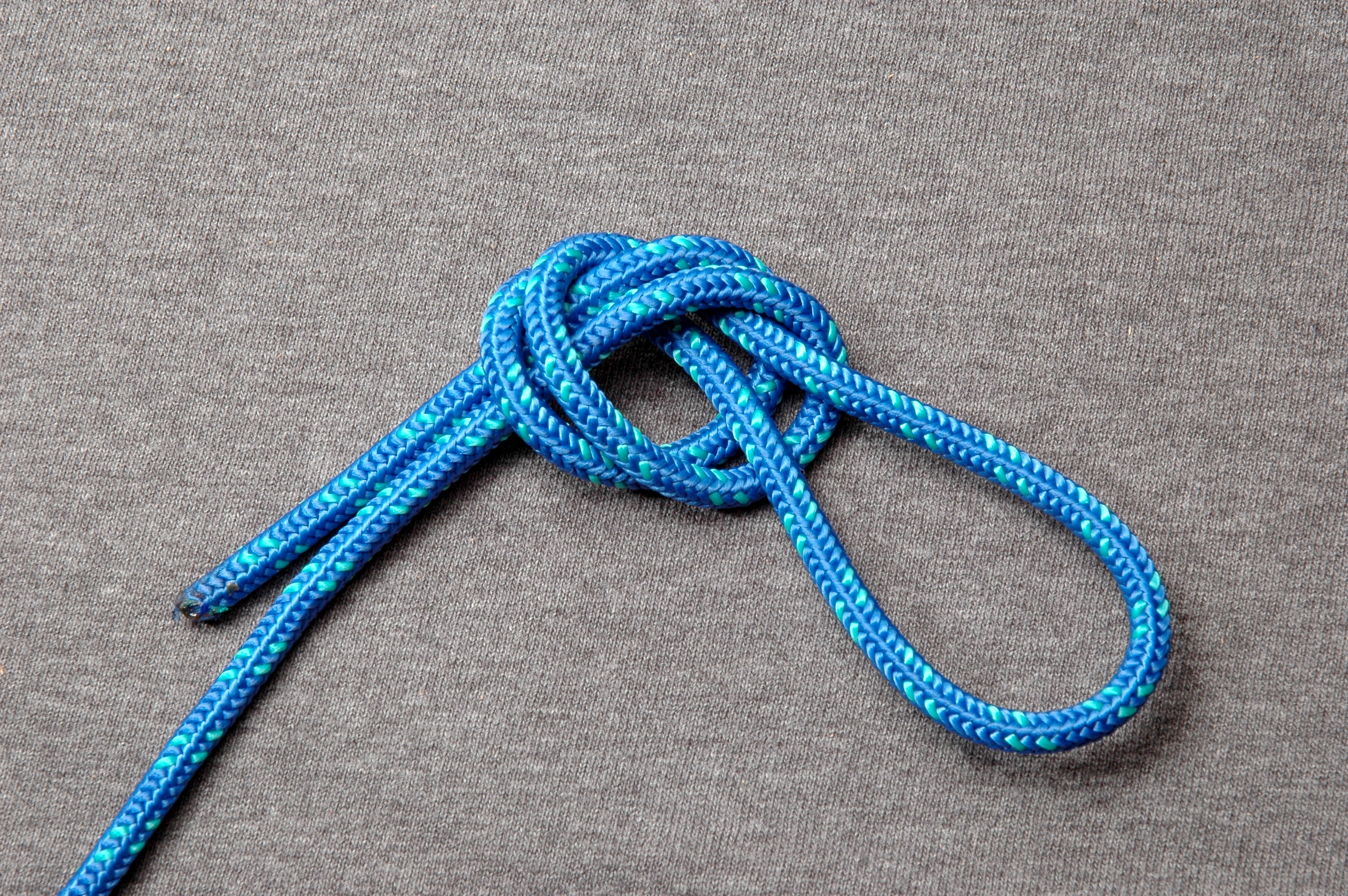 Overhand loop (ABOK #1046)